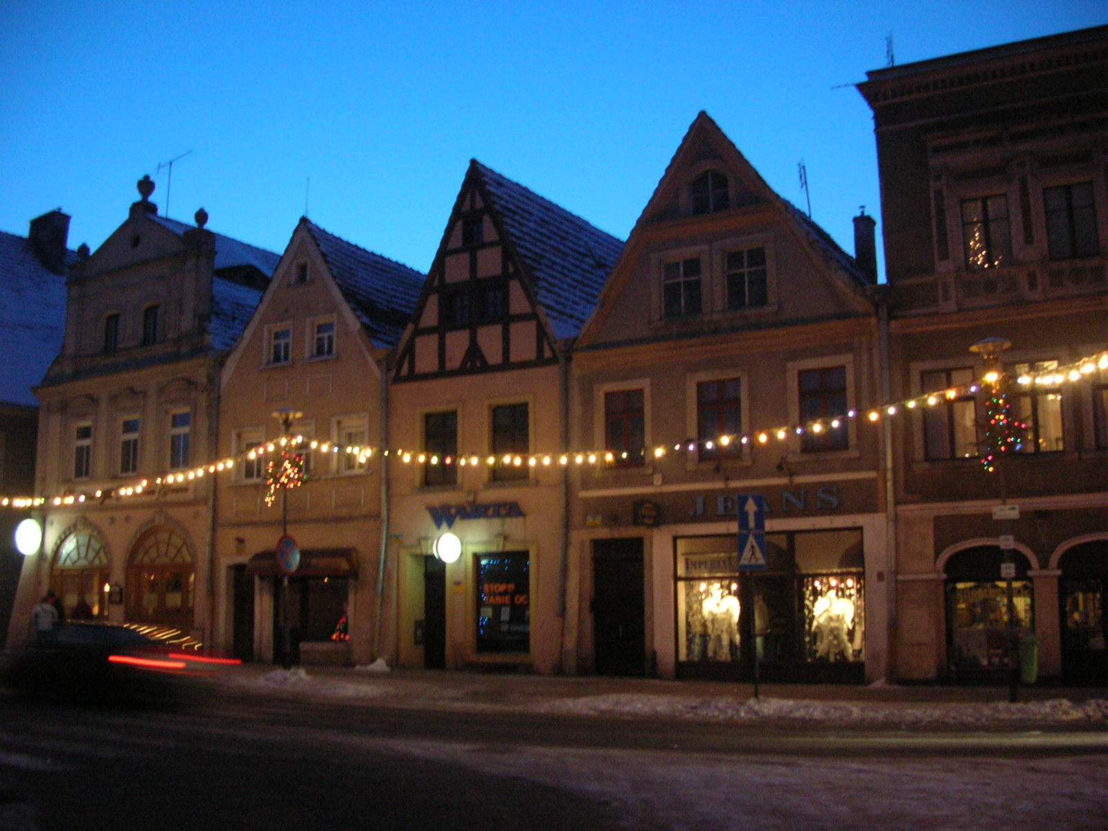 Gryfów Śląski - Kamieniczki w rynku Autor - Bartek Wawraszko